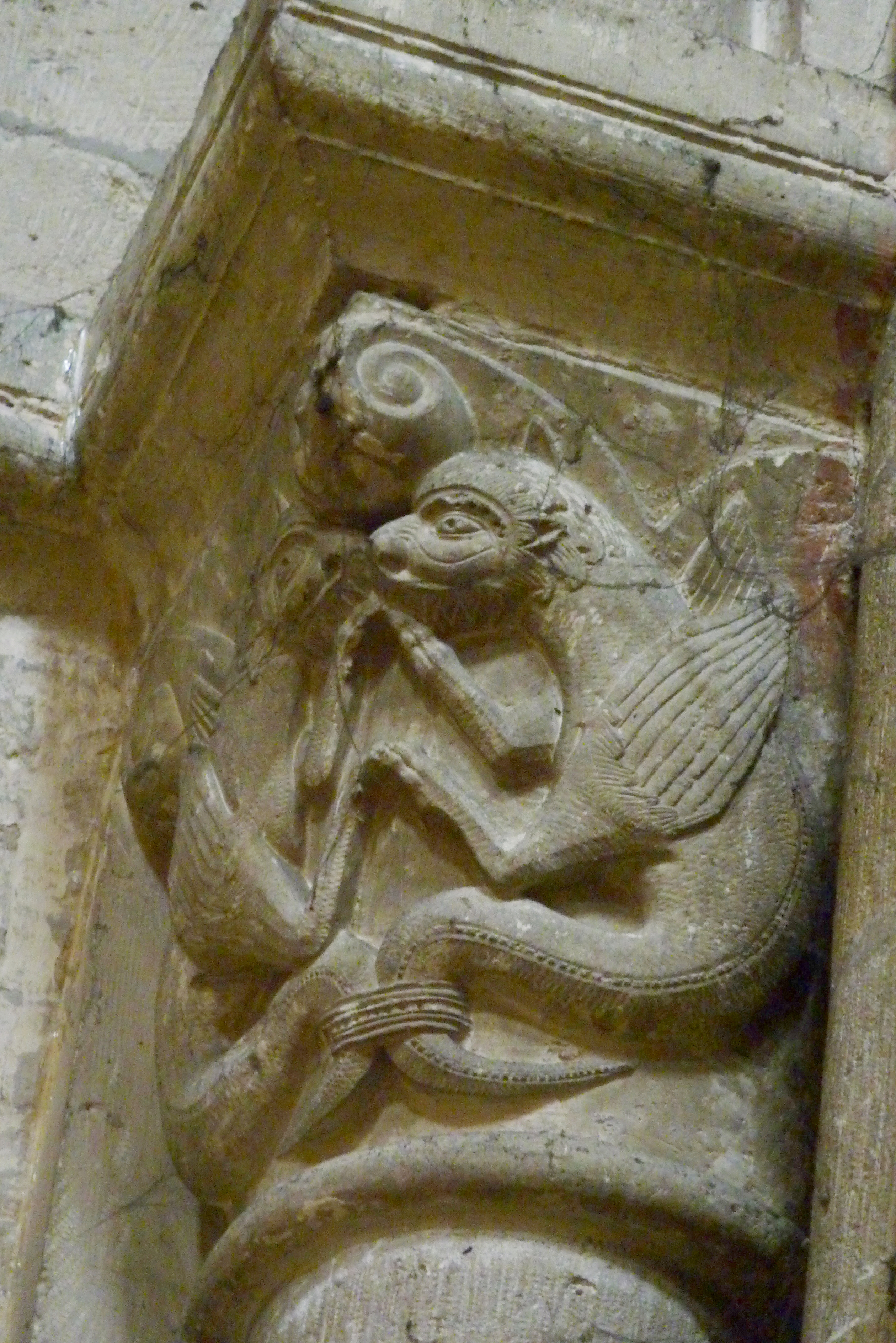 katholische Pfarrkirche Notre-Dame in Poissy)